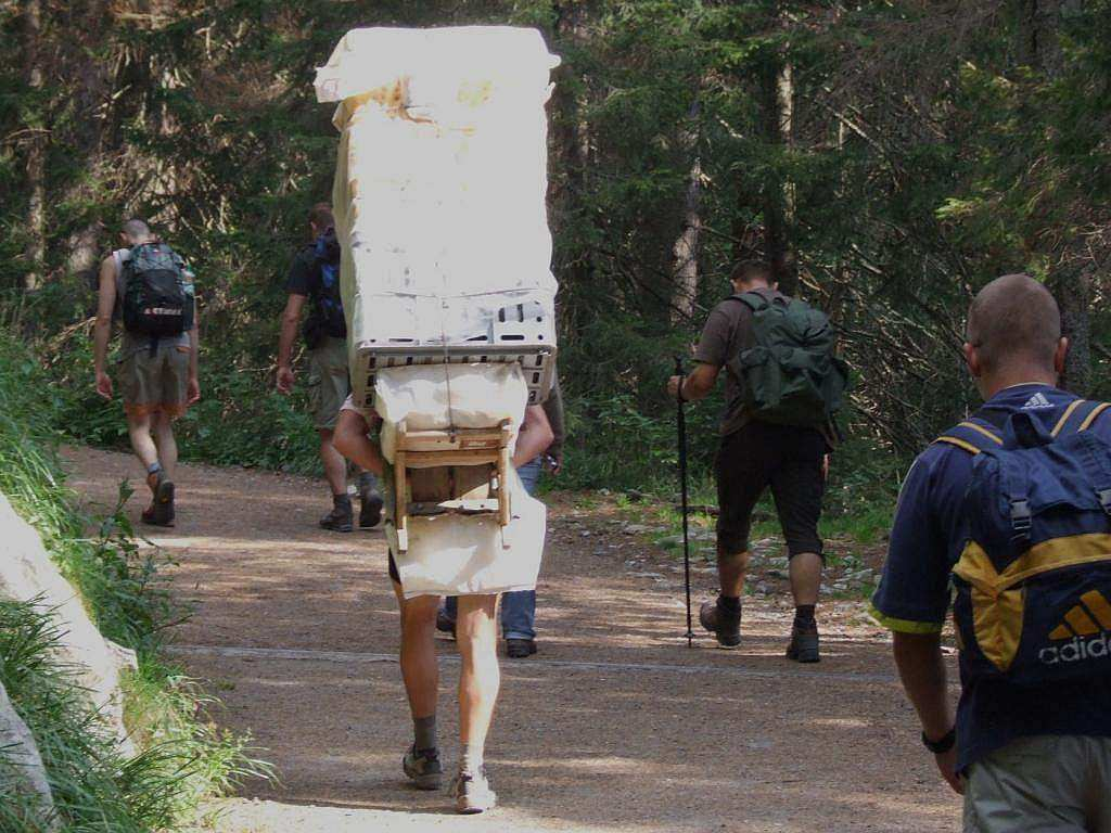 Nosicz w Tatrach słowackich